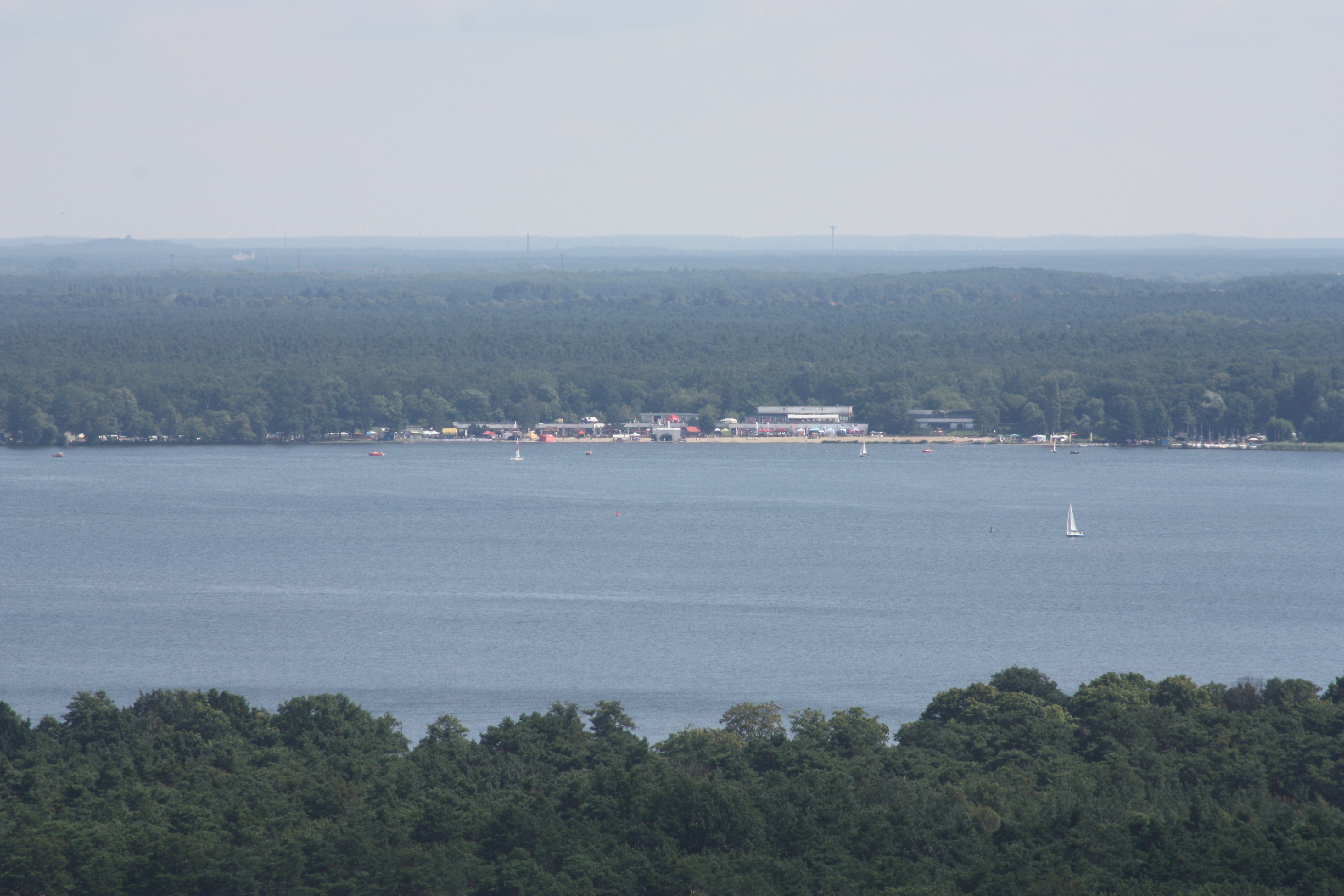 Müggelturm und Panoramablick über Müggelberge, Teufelssee, Dahme, Plänterwald, Fridrichshagen